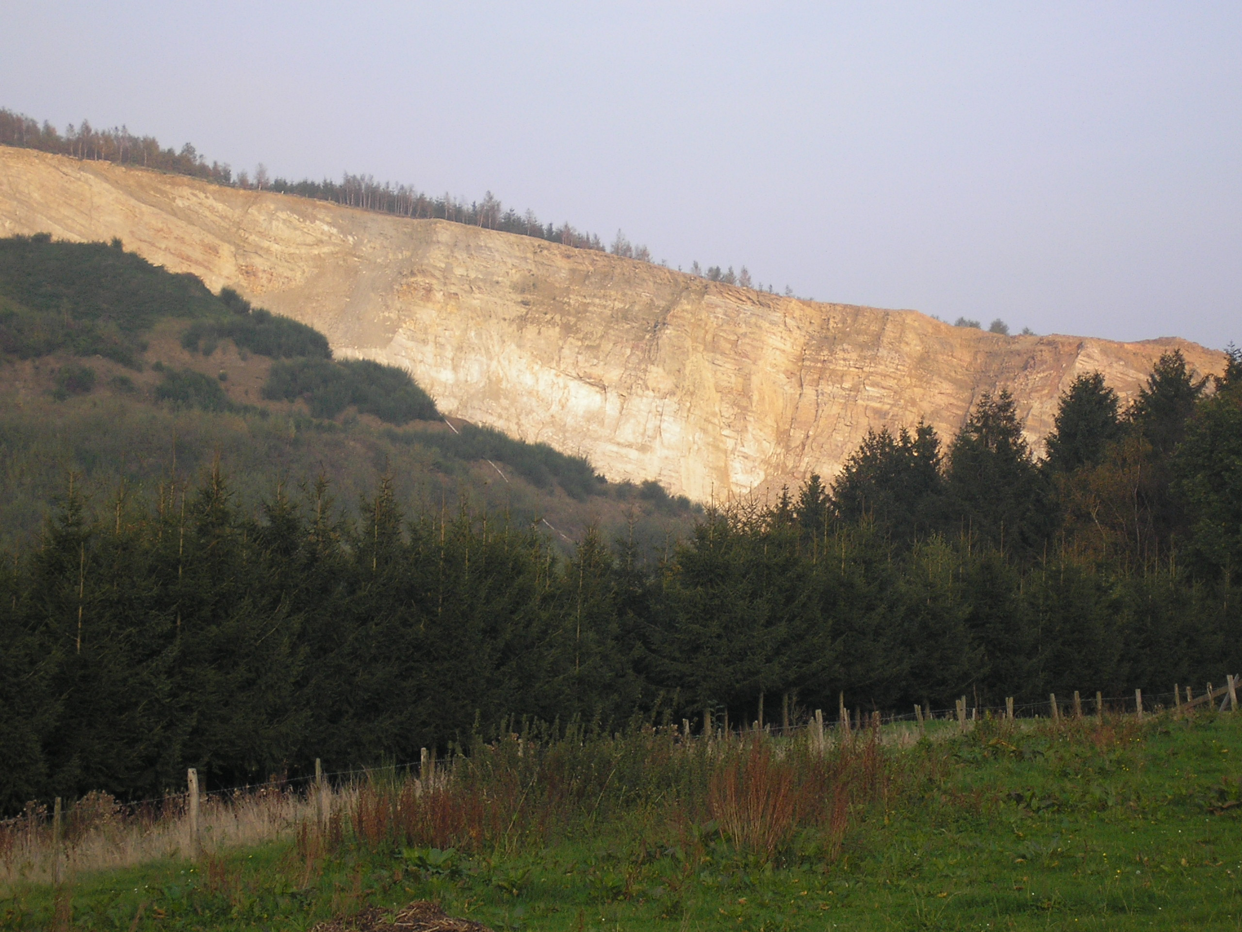 Steinbruch im Warchennetal, Waimes, East Belgium